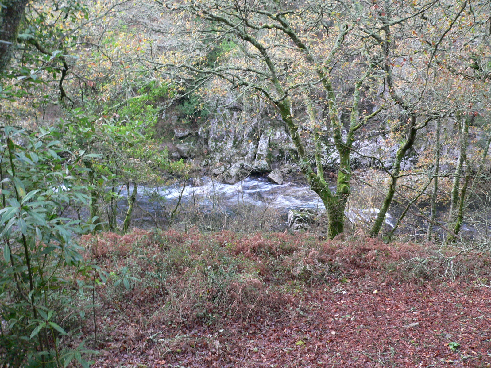 Rio Deza